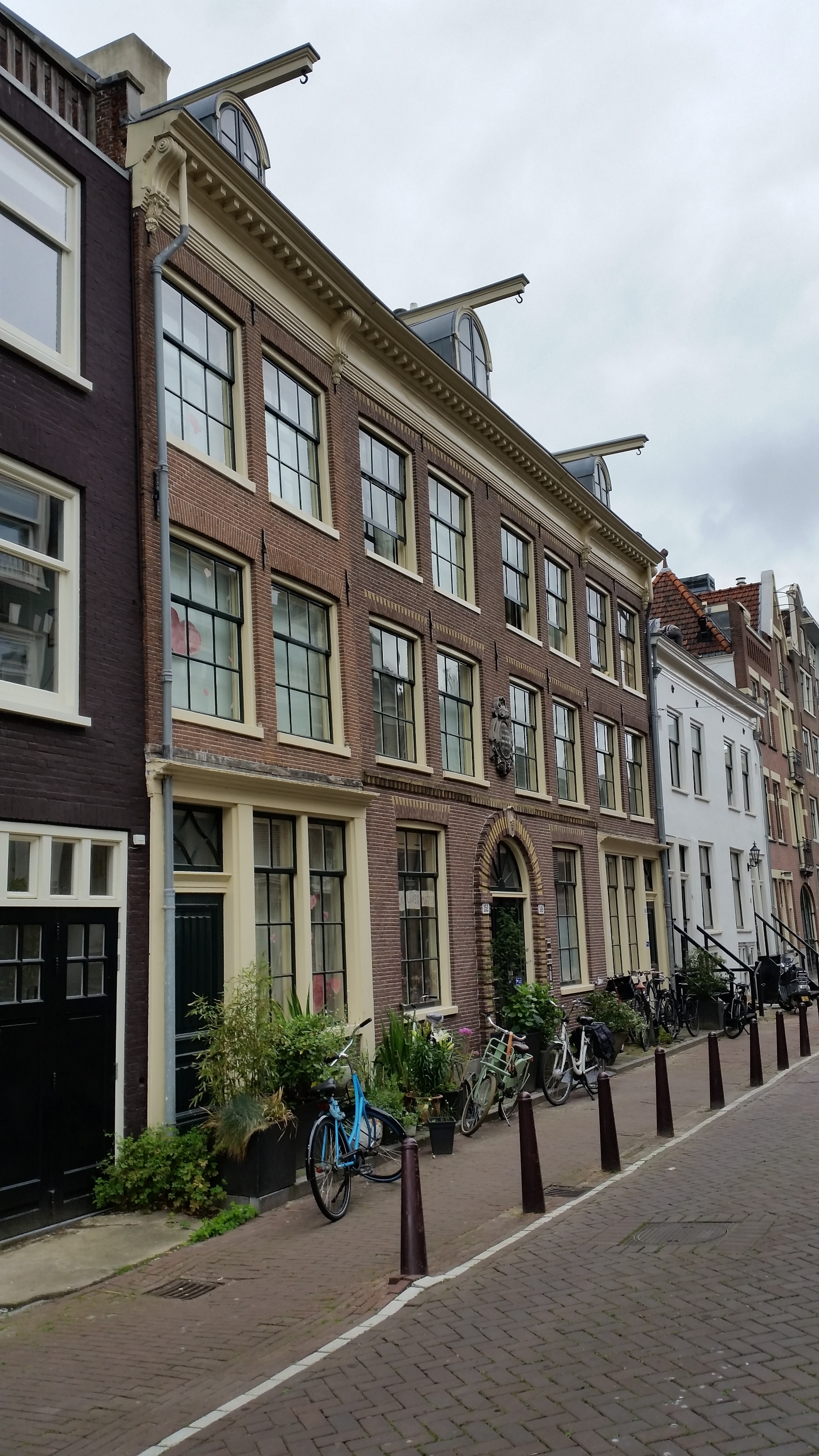 Hilmanhofje in 2020